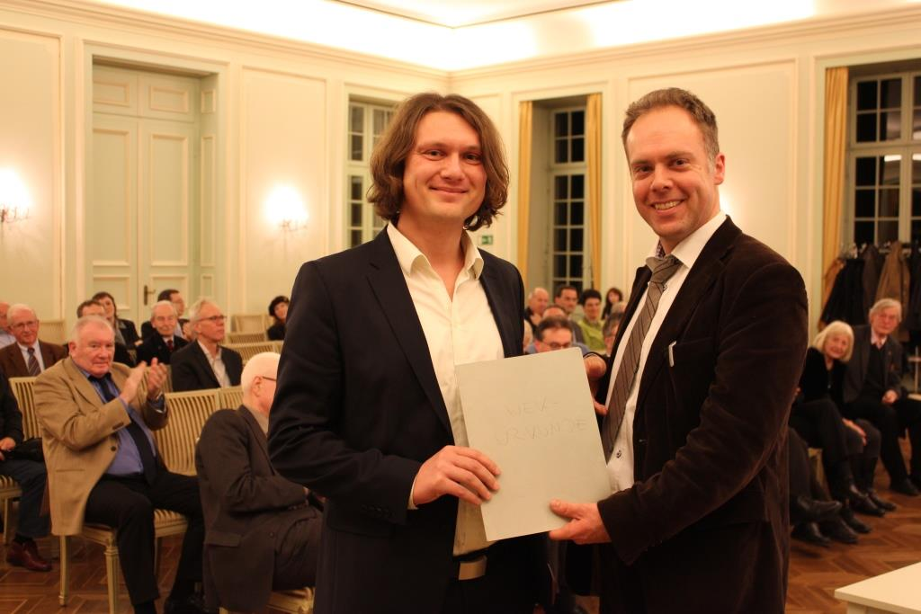 Wolf-Erich-Kellner-Preis Verleihung 2013. Mark Schweda, Laudator Prof. Dominik Geppert